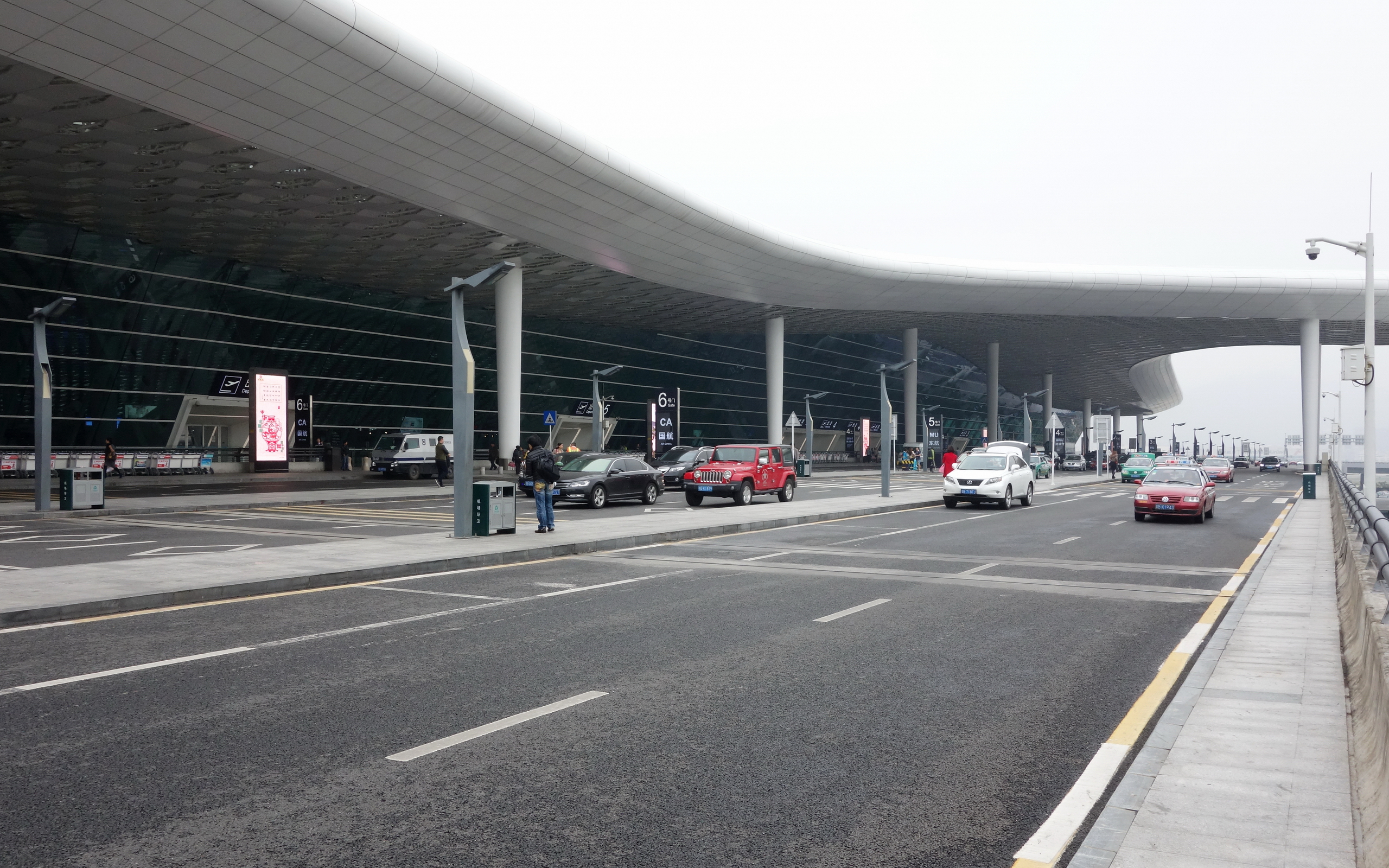 深圳宝安国际机场新航站楼出发大厅入口